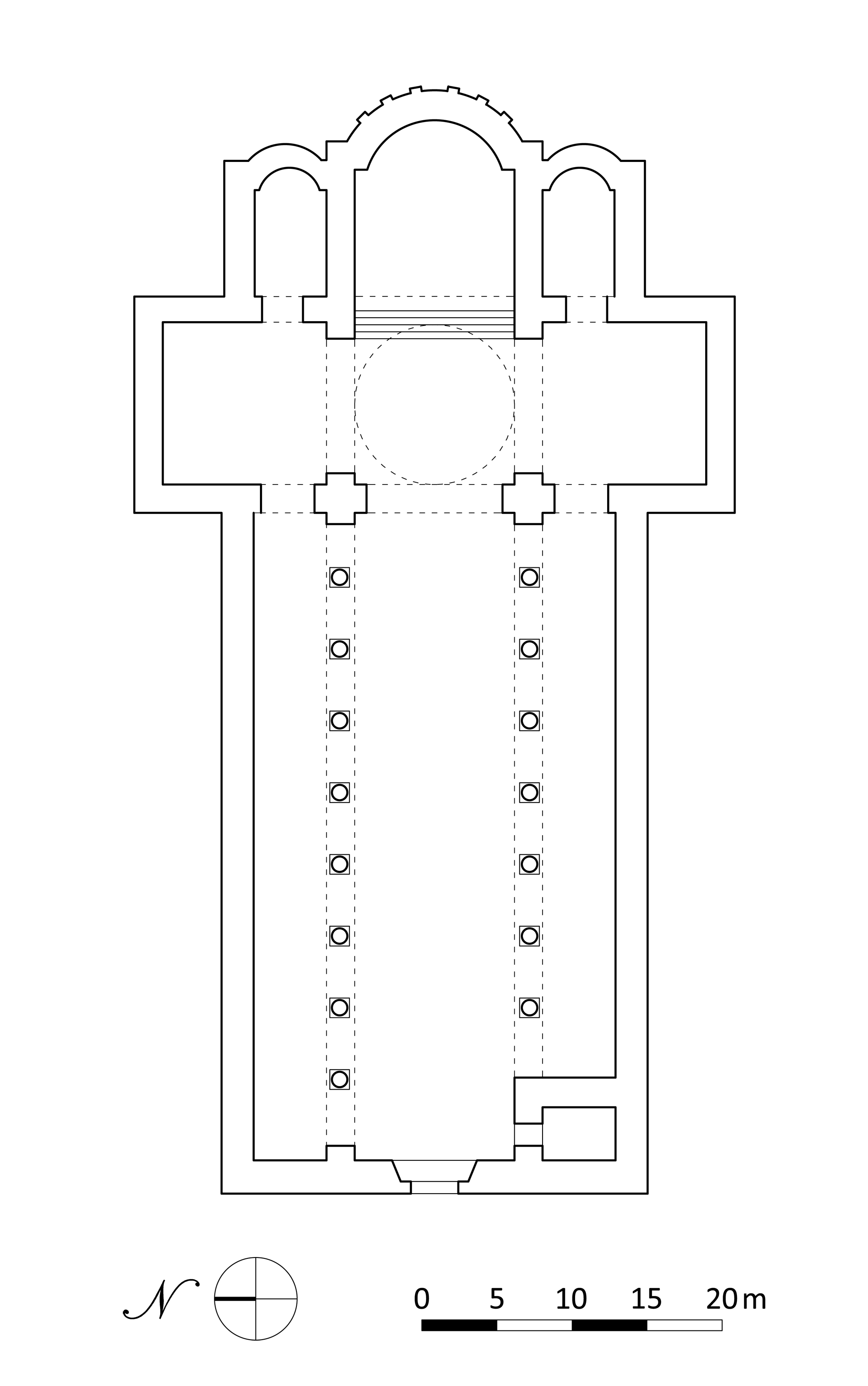 Pianta dell'Abbazia della Santissima Trinità di Mileto